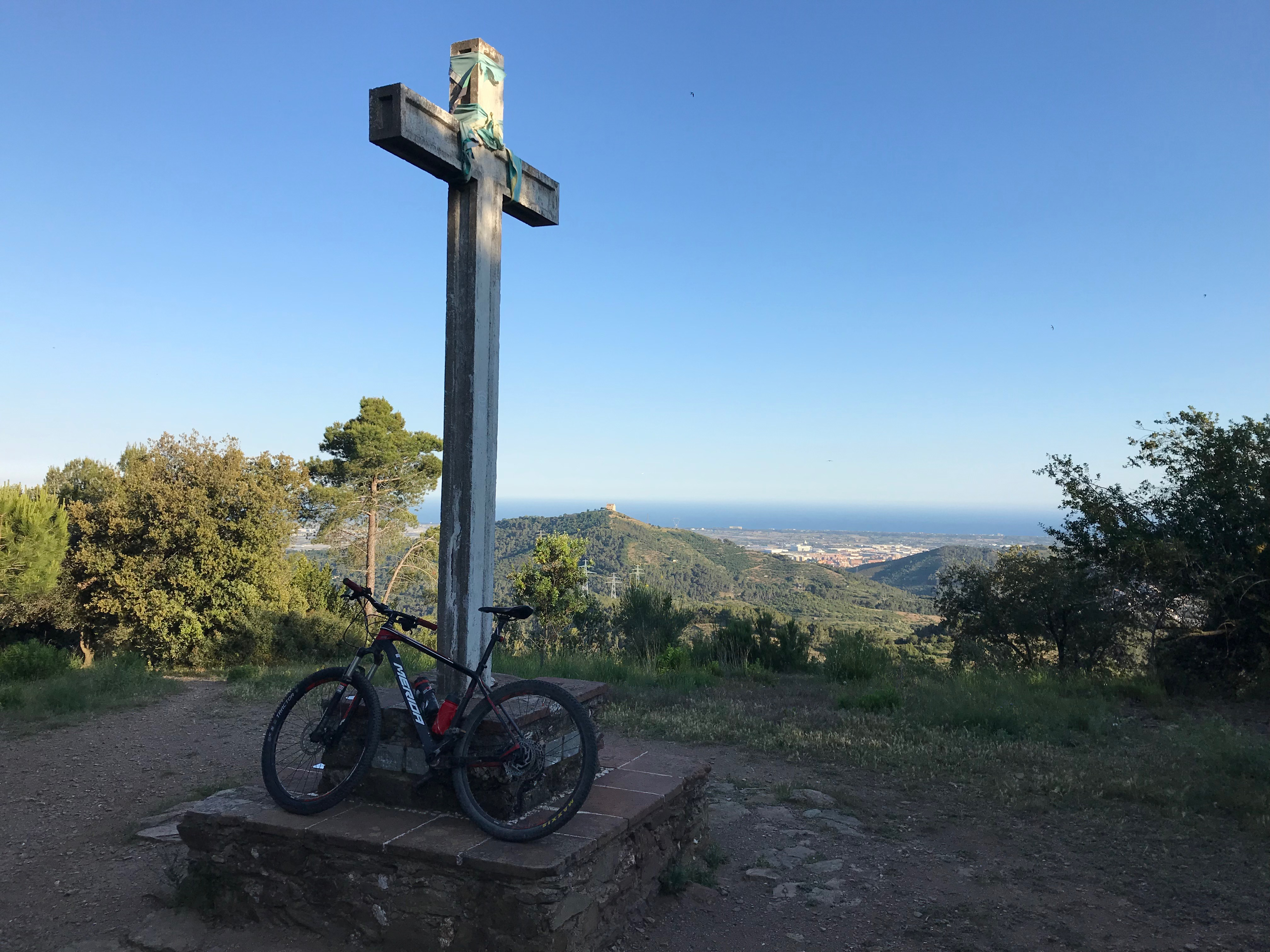 Vistes des de la creu de can Cartró a l'ermita de Sant Ramón